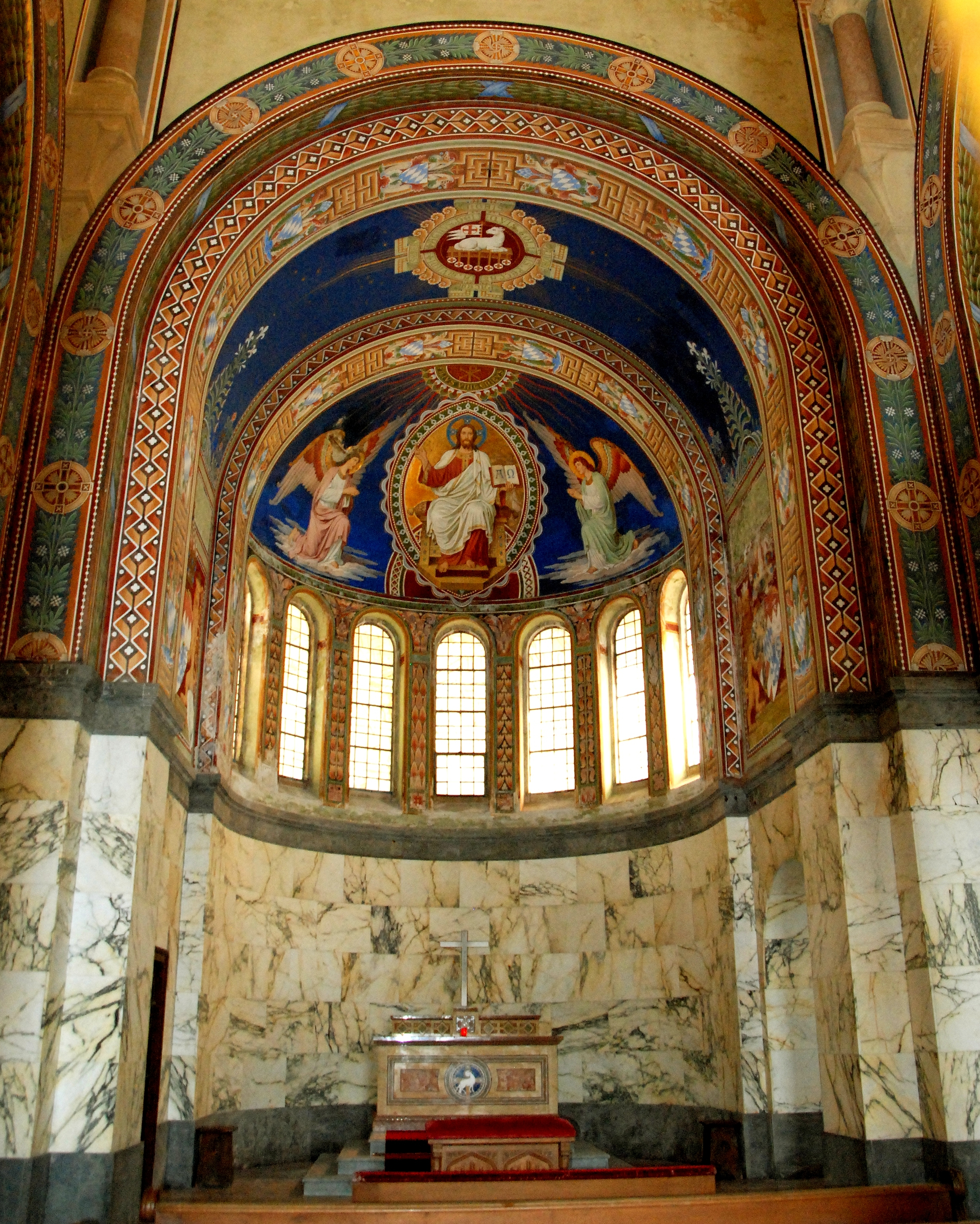 Berg am Starnberger See, Votivkapelle. Apsis der Kapelle zum Gedächtnis an König Ludwig II. von Bayern.